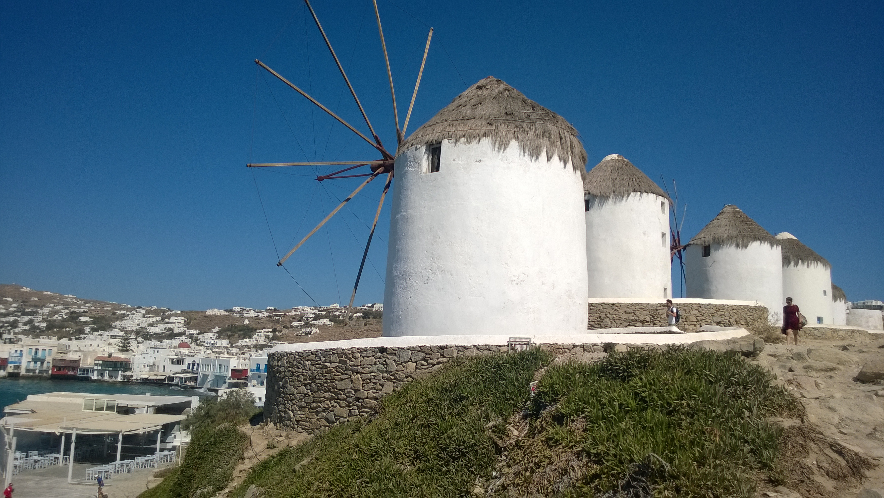 Mikonos 846 00, Greece